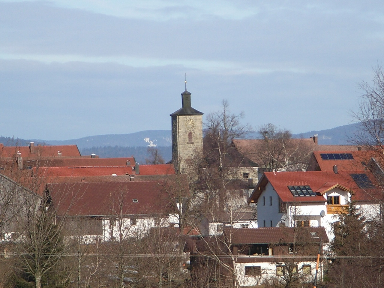 Schöfweg